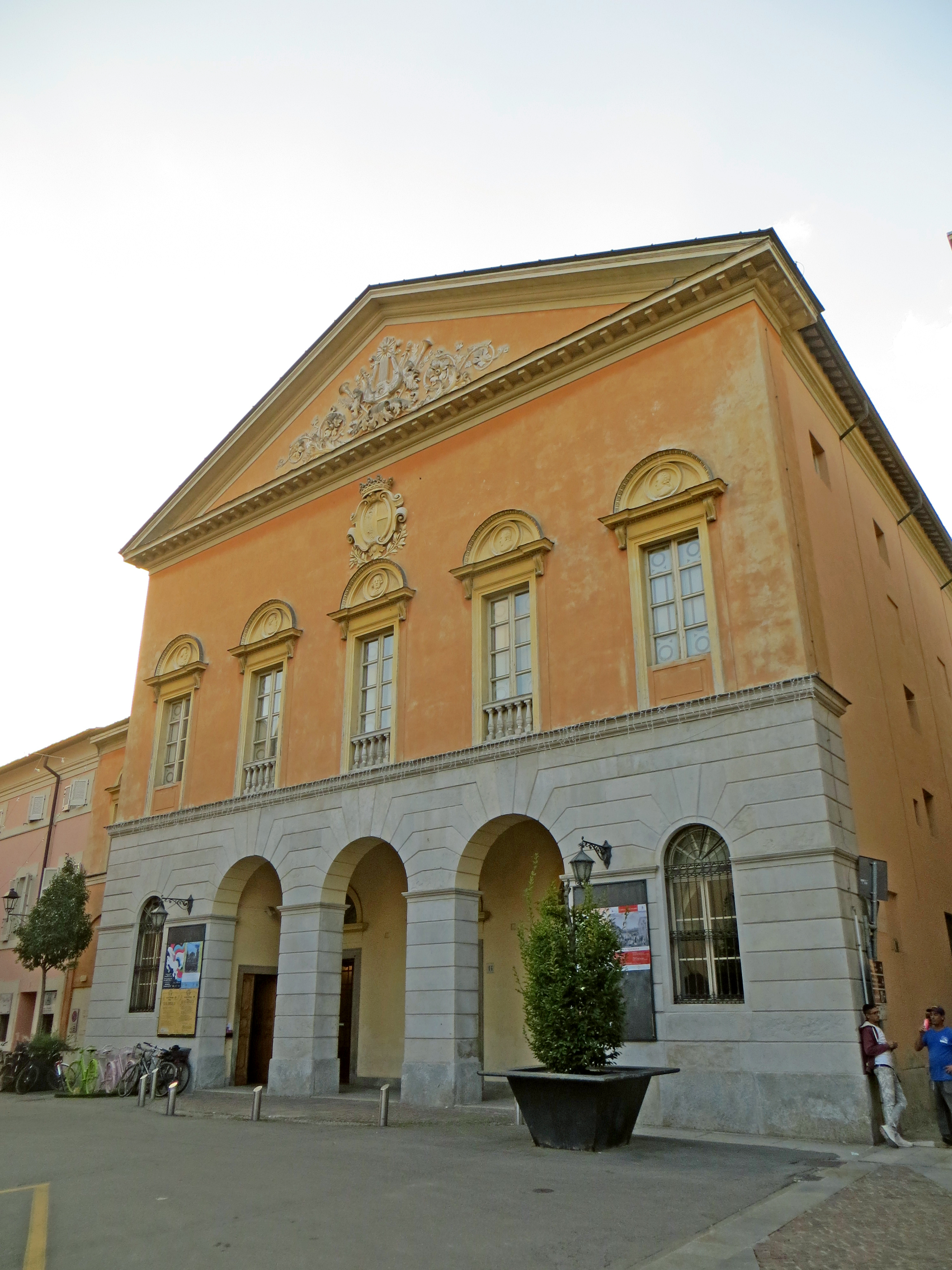 Teatro Girolamo Magnani (Fidenza) - facciata